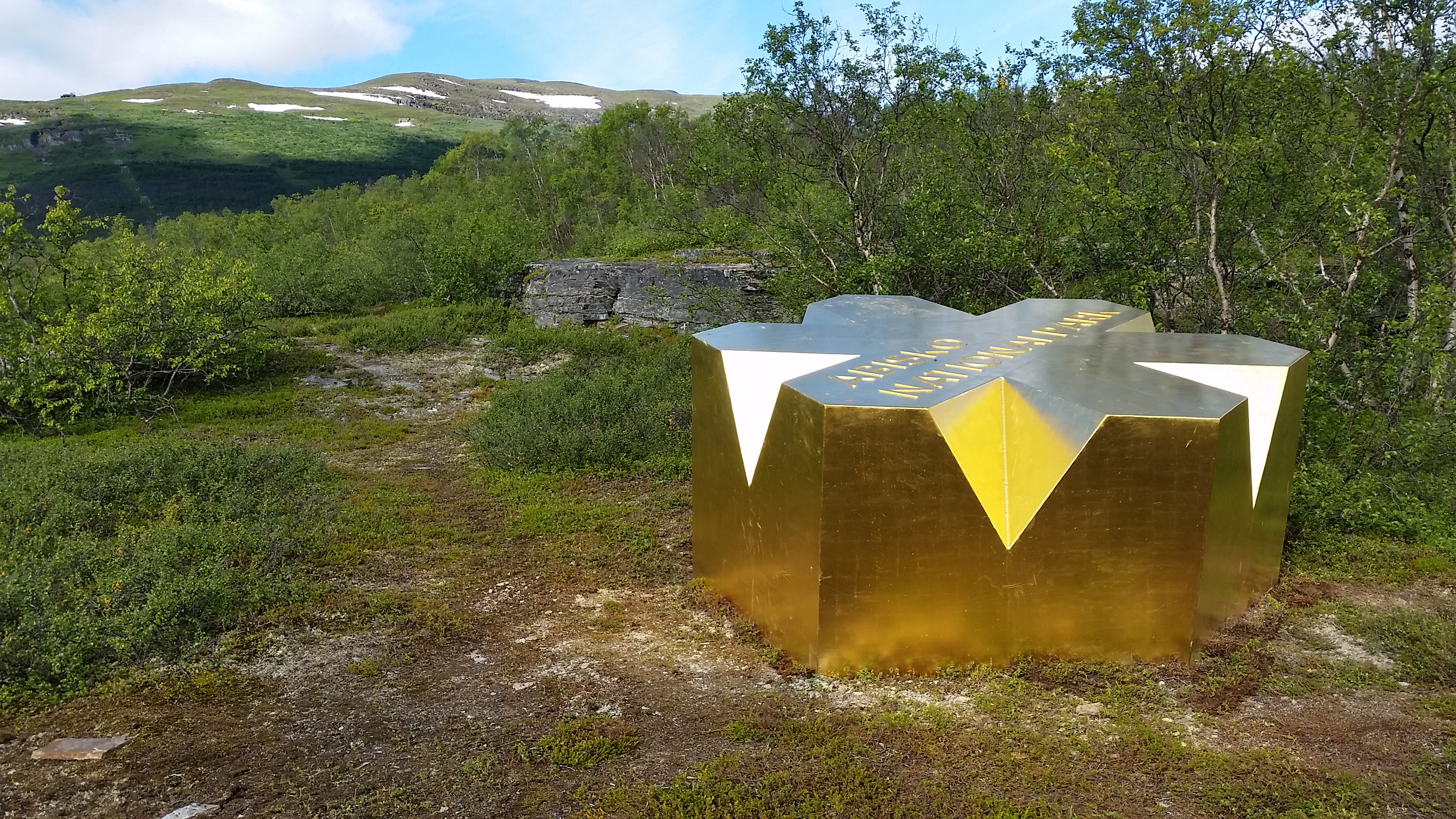 Guldkronan för Abisko nationalpark, 2 dagar efter utplacering.